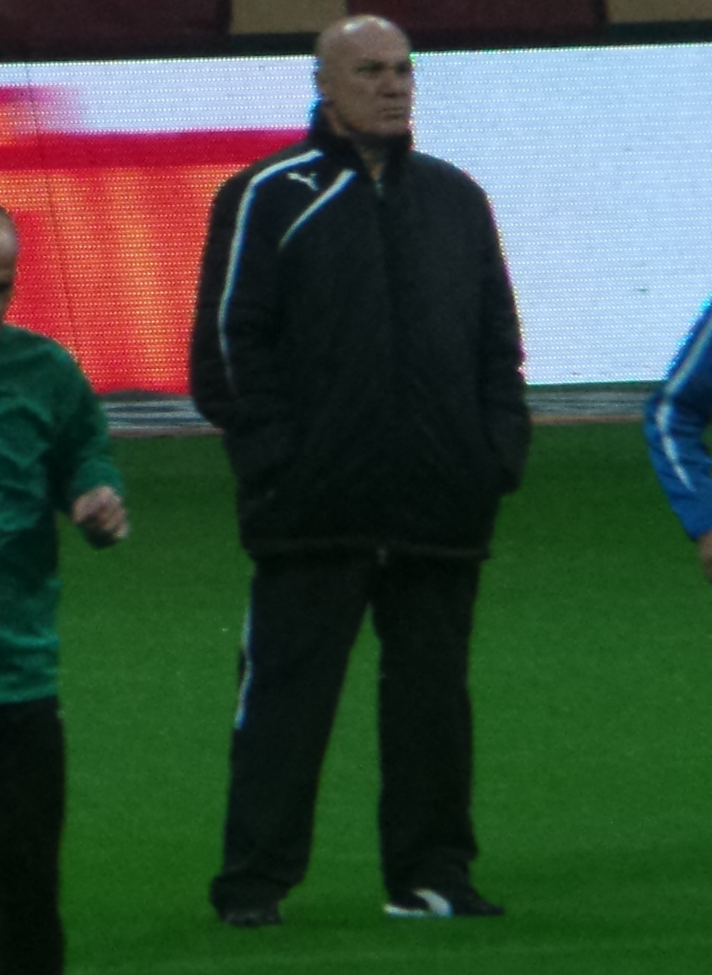 Yıldırım Uran